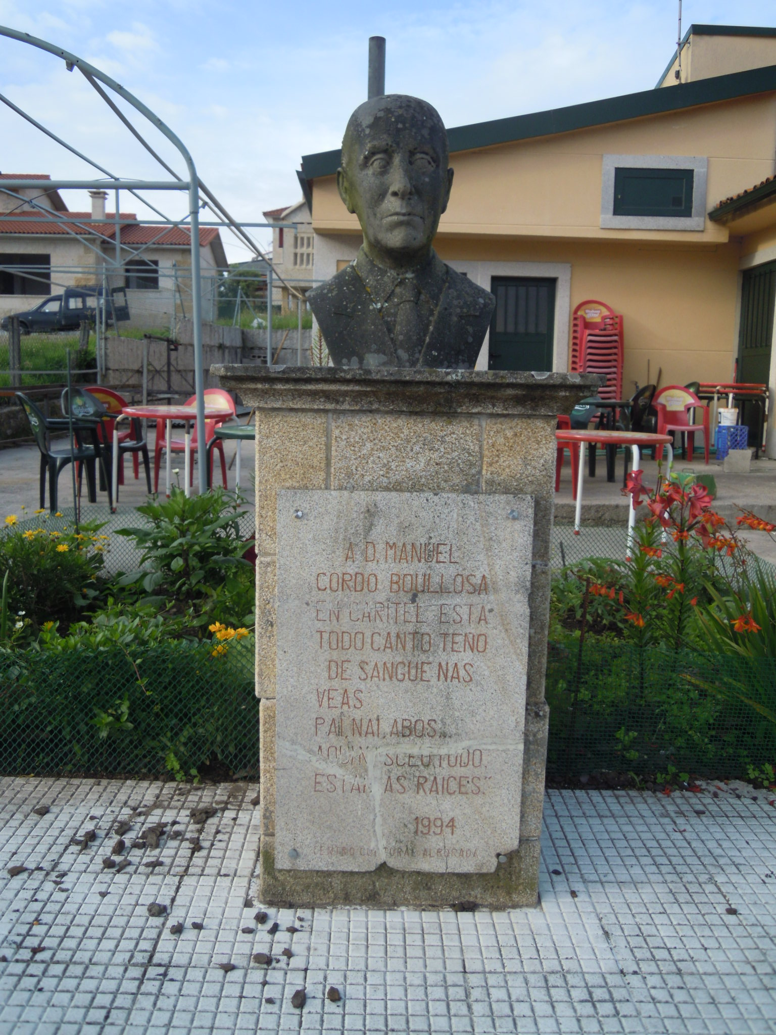 Busto en homenaxe a Manuel Cordo Boullosa en Caritel (Ponte Caldelas).